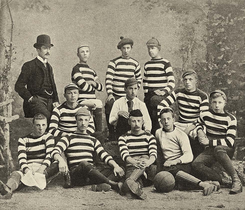 Historische teamfoto. Mit Pim Mulier (vorne, mit schwarzer Kappe)